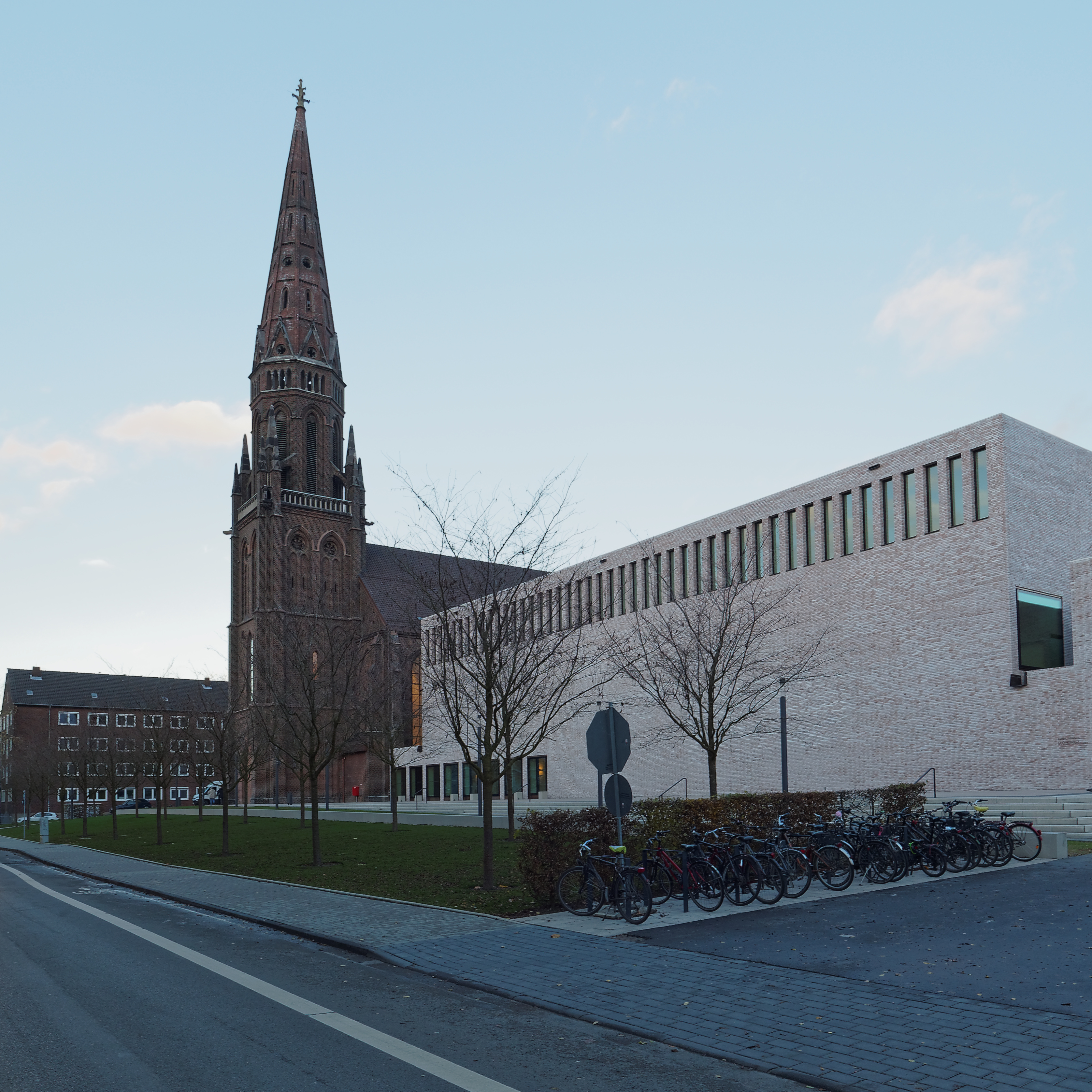 Anneliese Brost Musikforum Ruhr in Bochum, Westseite des großen Saales mit dem Turm der ehemaligen Marienkirche